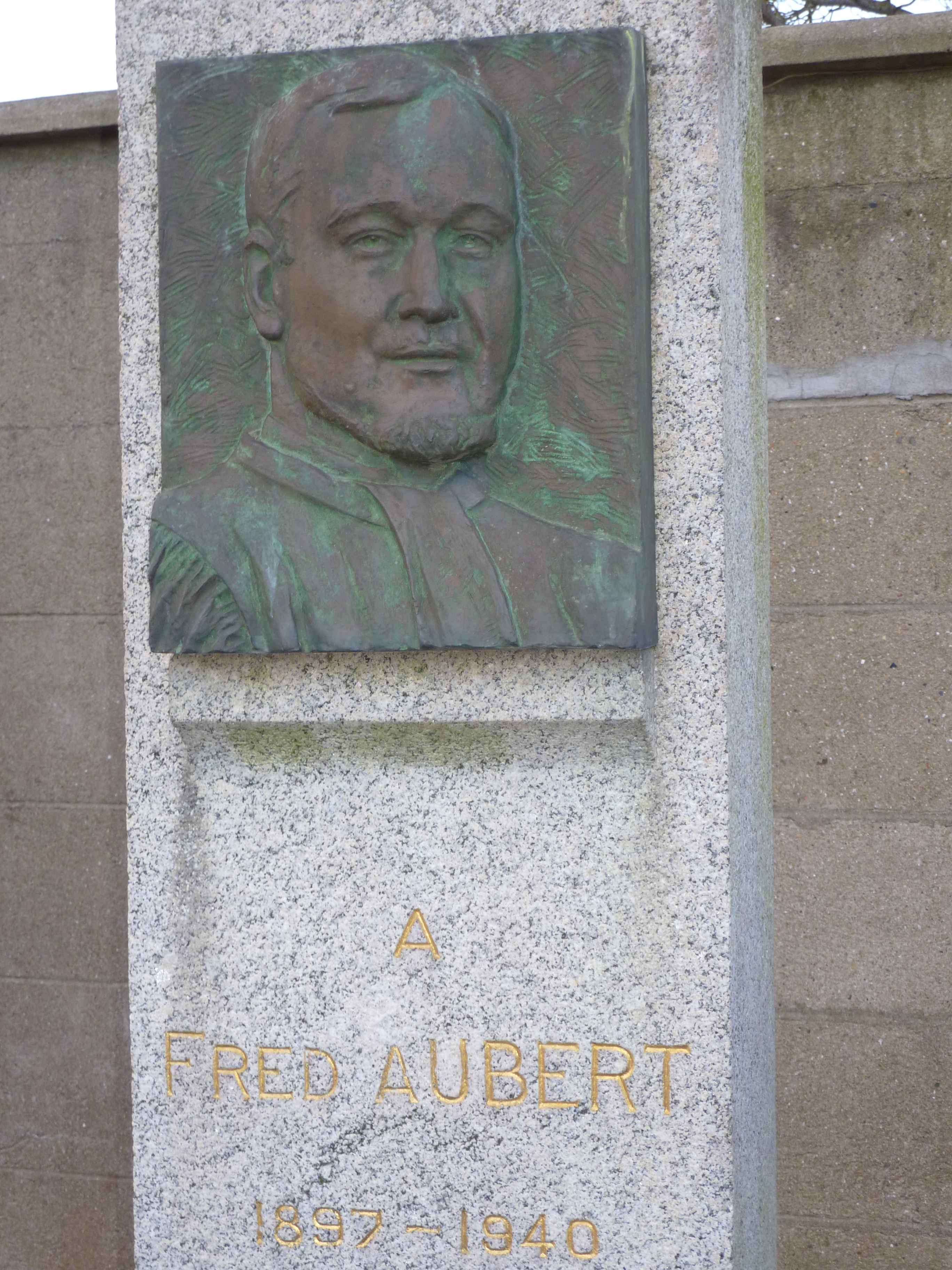 Stèle de Fred Aubert